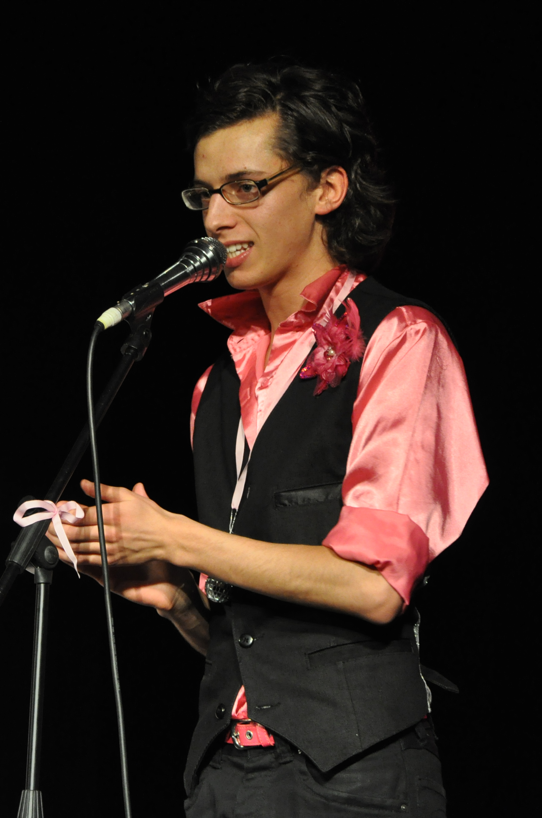 Jan Cina během koncertu revuální skupiny Olats otesoc.